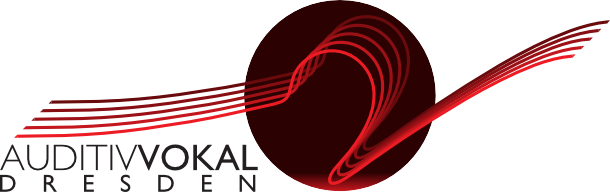 Logo AuditivVokal Dresden